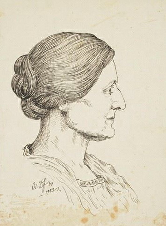 Партрэт грамадзкай дзяячкі Палуты Бадуновай (1885 - 1938)